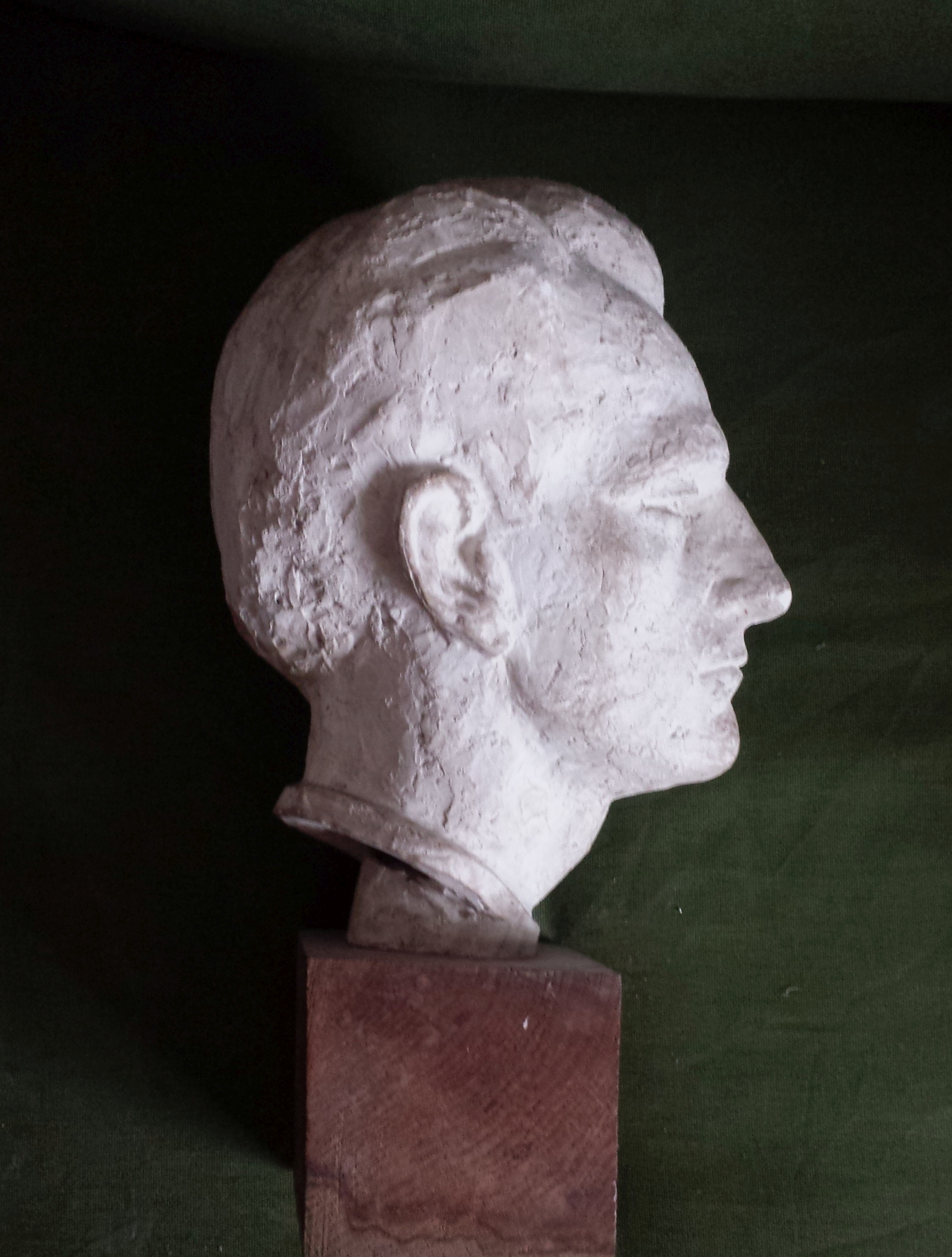 Büste von Günther Huster im Profil (Künstler unbekannt)